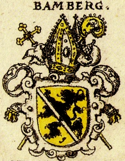 Wappen des Bistums Bamberg nach Siebmachers Wappenbuch